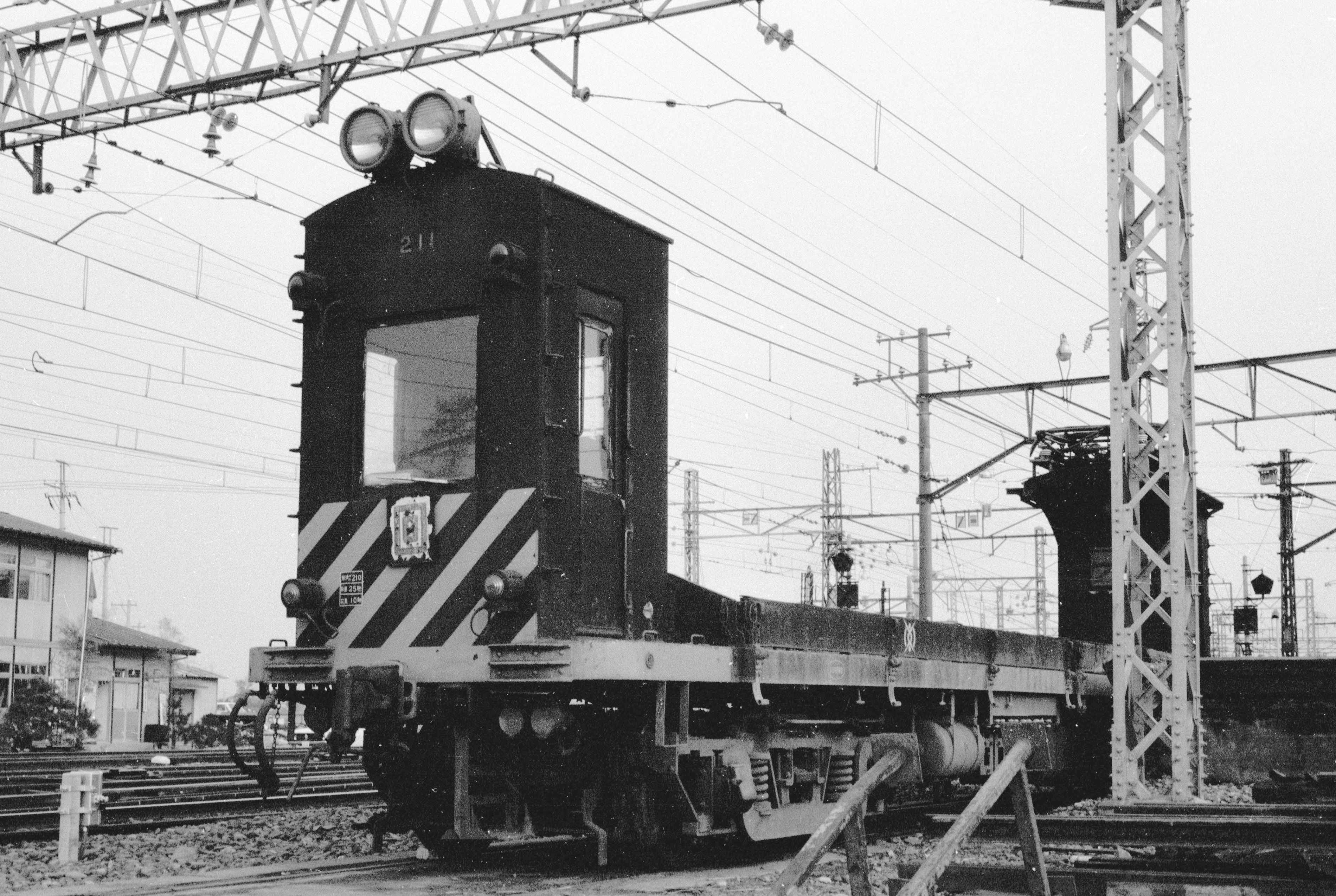 高幡不動検車区にて